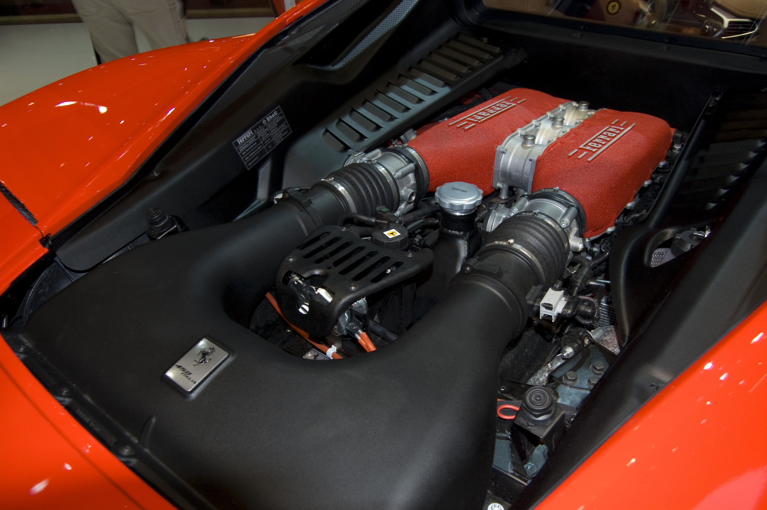 Ferrari 458 Italia's engine